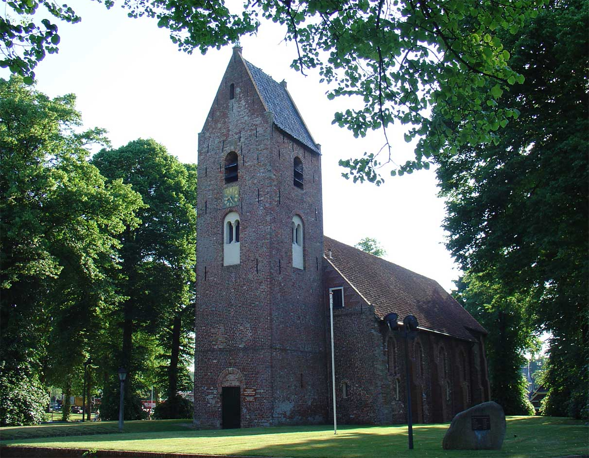 Sint-Margaretakerk te Norg (protestants)